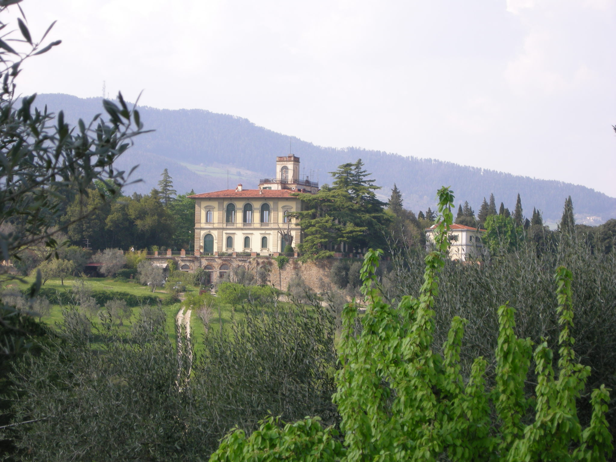 Villa salvini